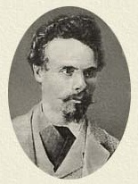 Michail Fëdorovič Gračevskij (1853-1884)